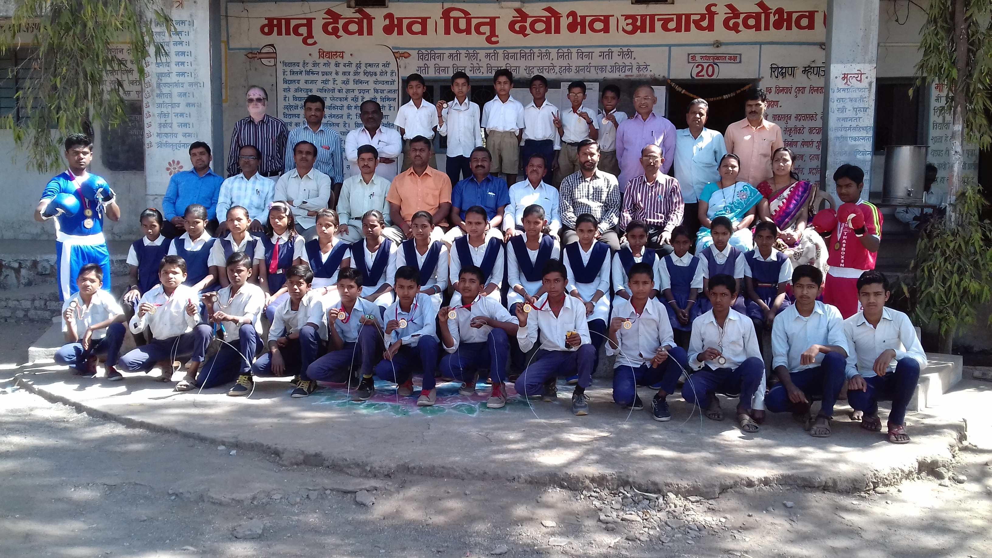 school